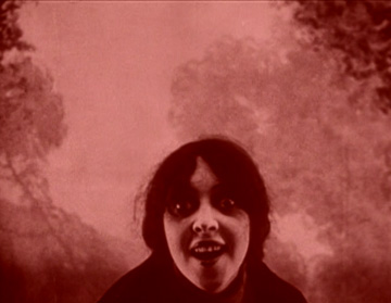 1915 screenshot of actress Musidora in the Louis Feuillade-directed film series Les Vampires